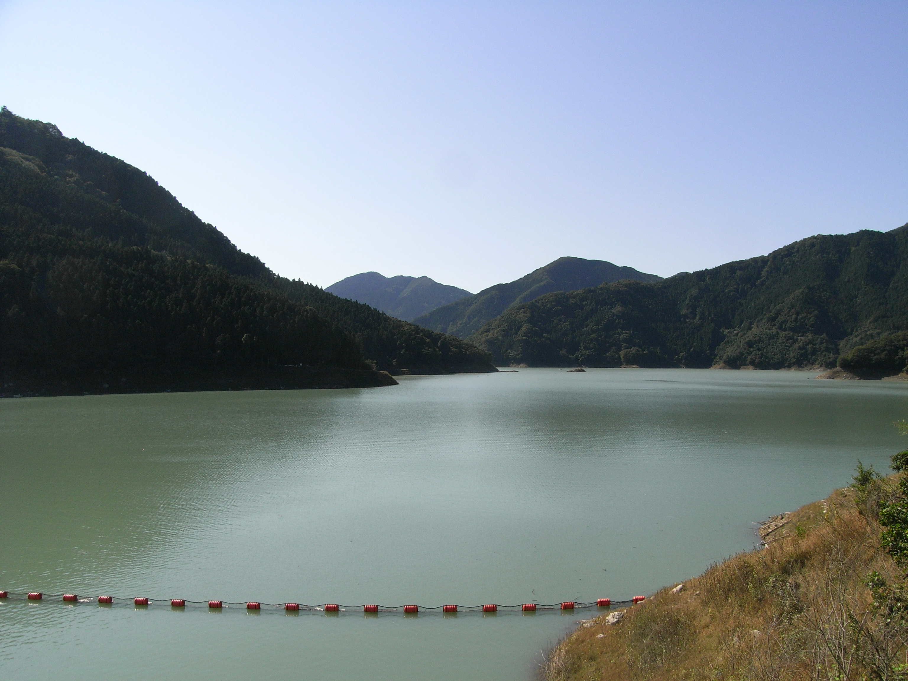 Lake